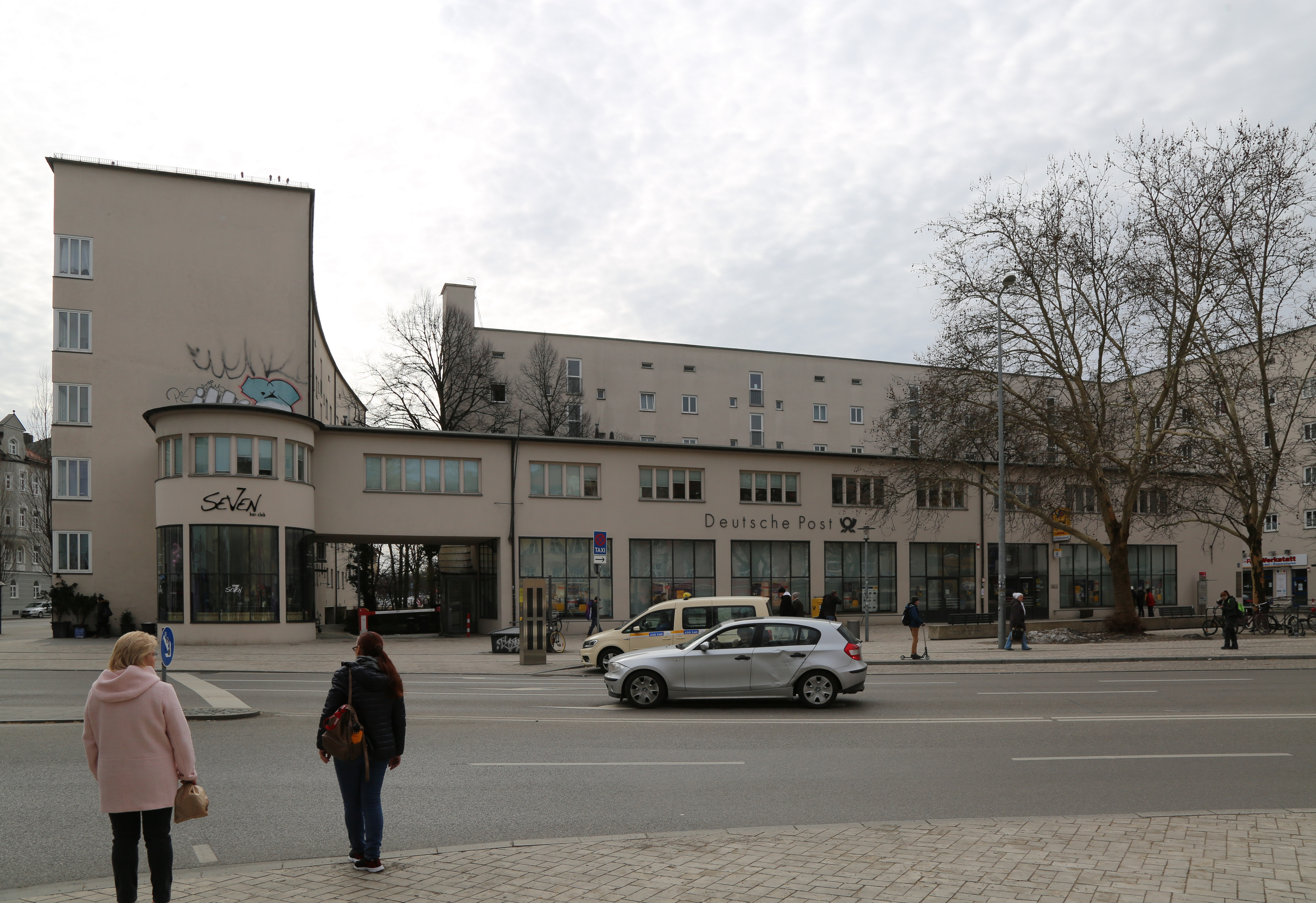 Das Postamt am Münchner Harras ist ein Bau der Moderne von 1931/32. Architekten Robert Vorhoelzer und Franz Xaver Holzhammer.